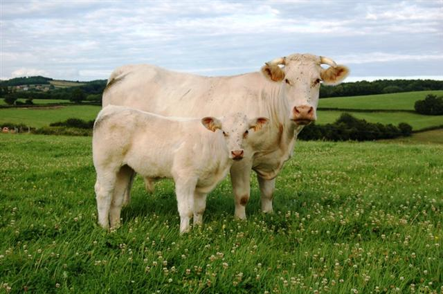 Vache de race charolaise avec son veau (France).